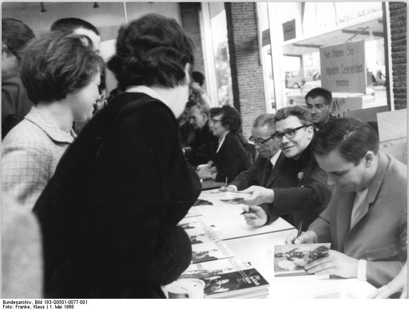 Zentralbild Franke 1.5.68 Volksfest in der Berliner Karl-Marx-Allee am 1. Mai 1968 . Am Nachmittag des 1. Mai 1968 war die Karl-Marx-Allee Treffpunkt der Berliner. Zahlreiche Veranstaltungen boten die Möglichkeiten froher Unterhaltung und interessanter Begegnungen. Auf dem Buch-Bild-Noten-Basar in der Berthold-Brecht-Bibliothek wurden die bekannten DDR-Publizisten Gerhard Scheumann (rechts) und Walter Heynowski (links daneben) dicht umringt, als sie ihre signierten Bücher "Der lachende Mann" und "Piloten im Pyjama" zum Verkauf anboten.